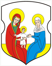 Herb miasteczka Horodec